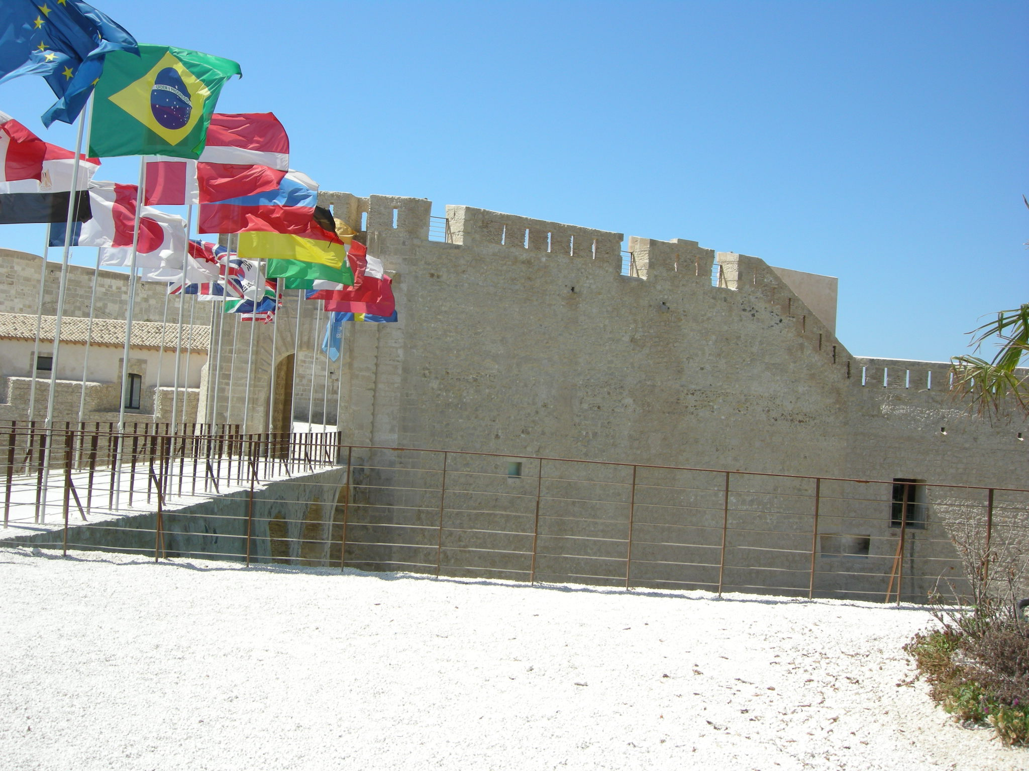 Ortigia, castello maniace